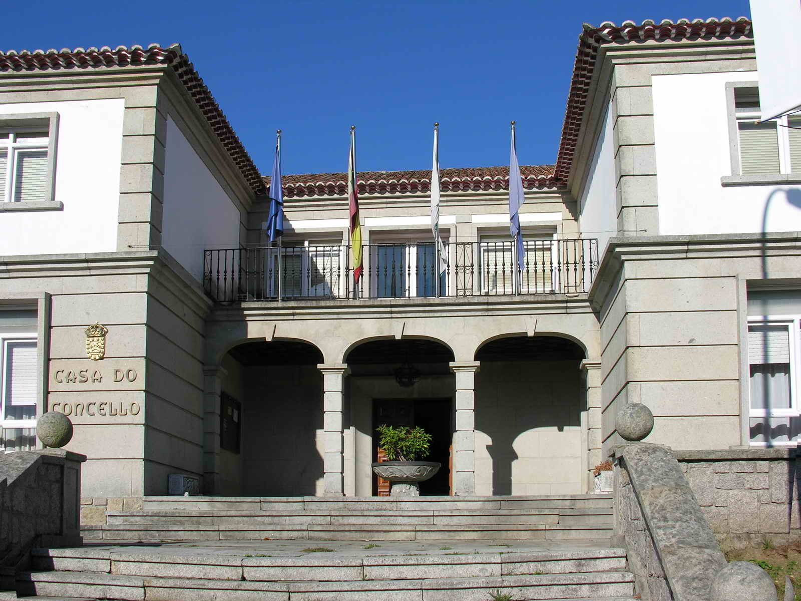 Ramallosa - Teo - Galicia - Spain